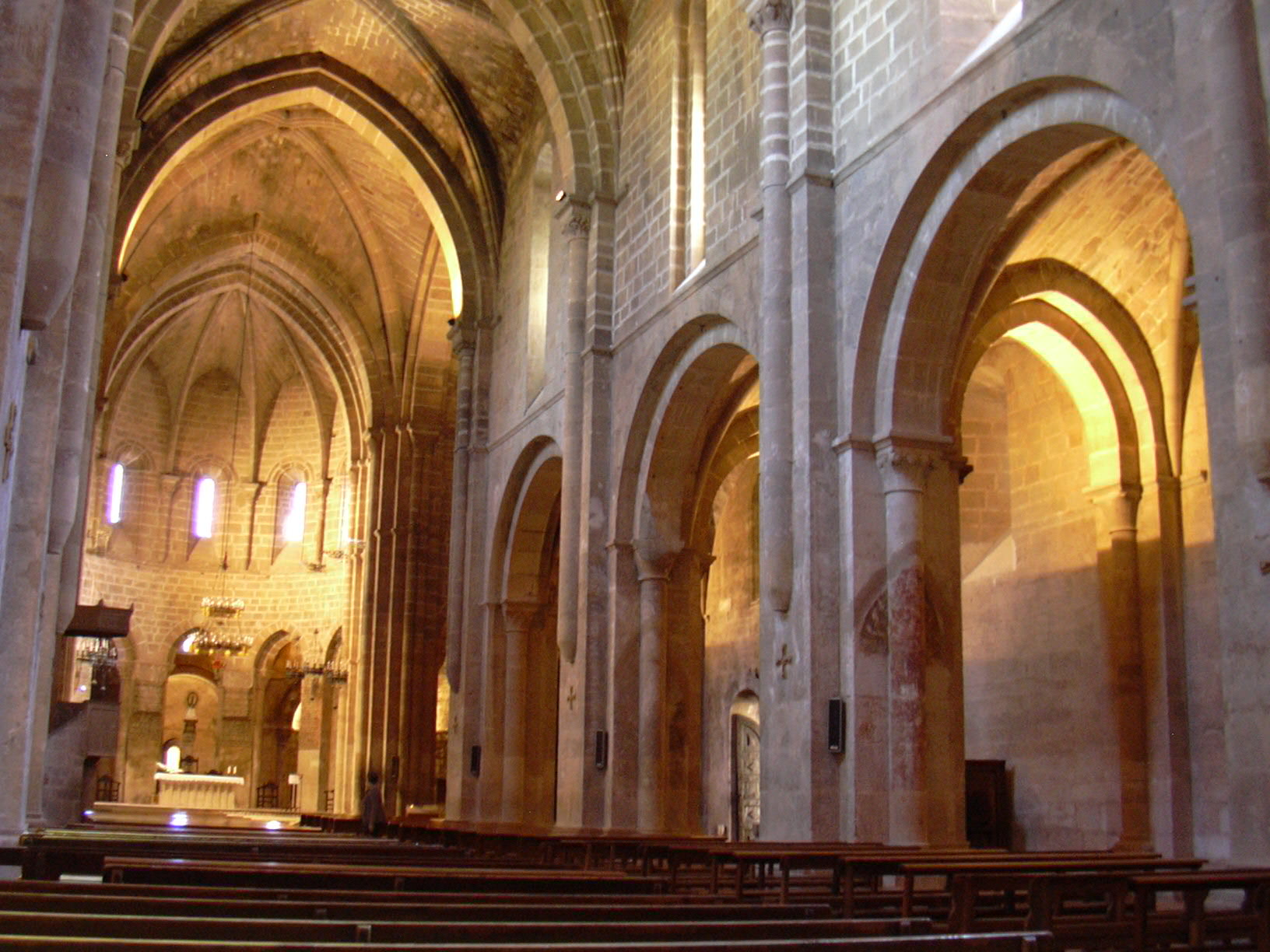 Veruela - Iglesia abacial de Santa María de Veruela - Vista desde el pie